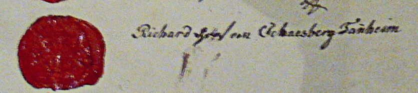 Verein der mediatisierten Fürsten und Grafen, Instruktion für die Bevollmächtigten beim Frankfurter Bundestag vom 12. Dezember 1815, Ausschnitt der letzten Seite mit dem Unterschrift des Grafen von Schaesberg-Tannheim. Fürstlich Waldburg-Zeil'sches Gesamtarchiv Schloss Zeil